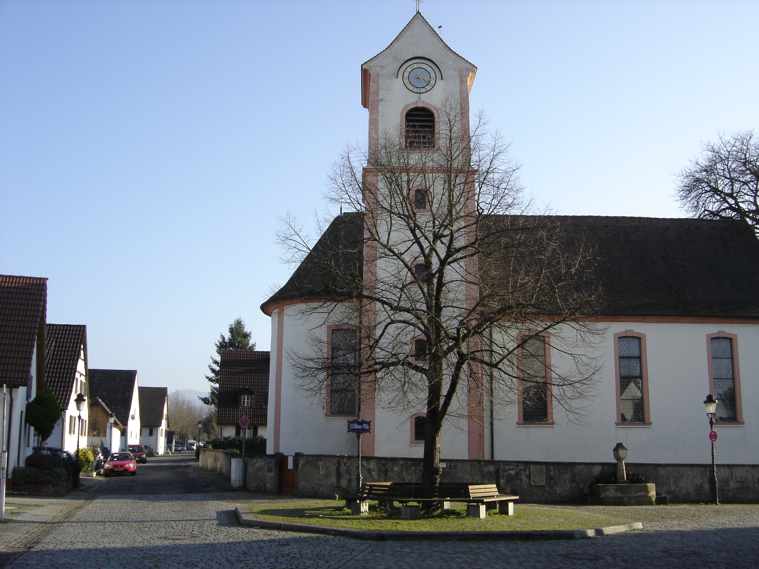 Freiburg Betzenhausen